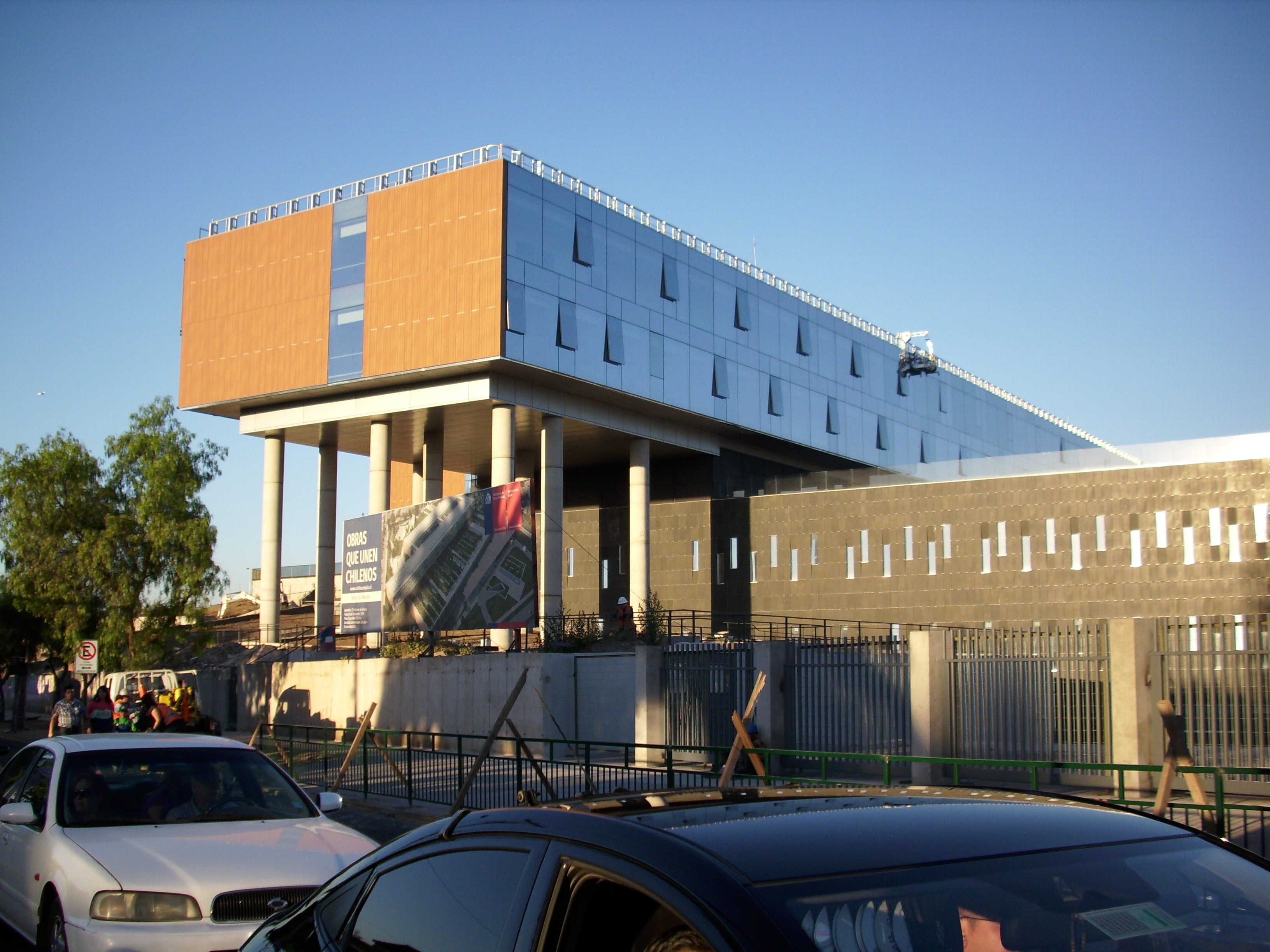 El Hospital El Carmen, Dr. Luis Valentín Ferrada durante su construcción. Maipú, Santiago de Chile, 15 de noviembre de 2013.